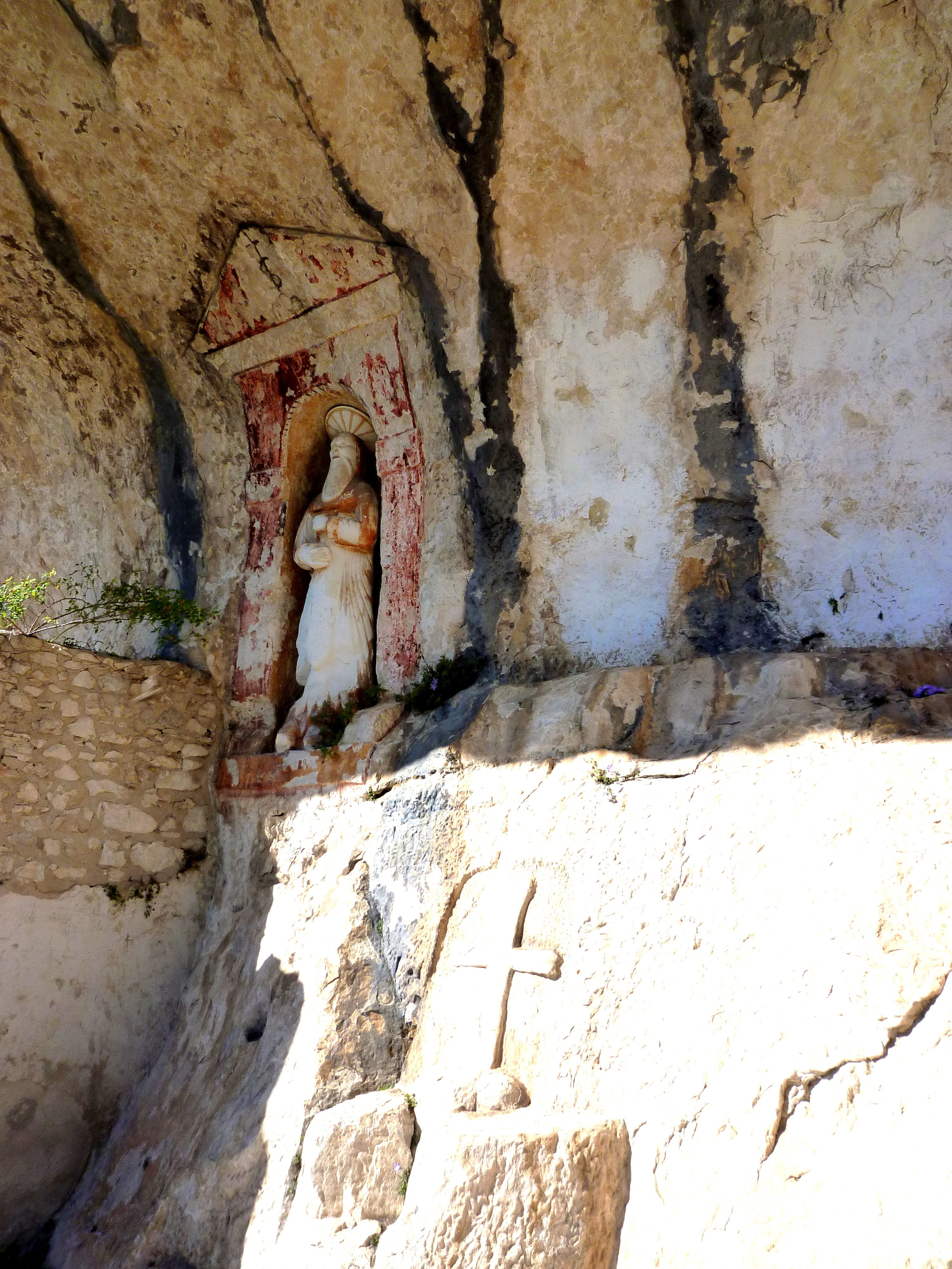 Eremo di Santo Spirito a Majella. Roccamorice, Pescara.